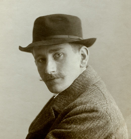 Erich Kux